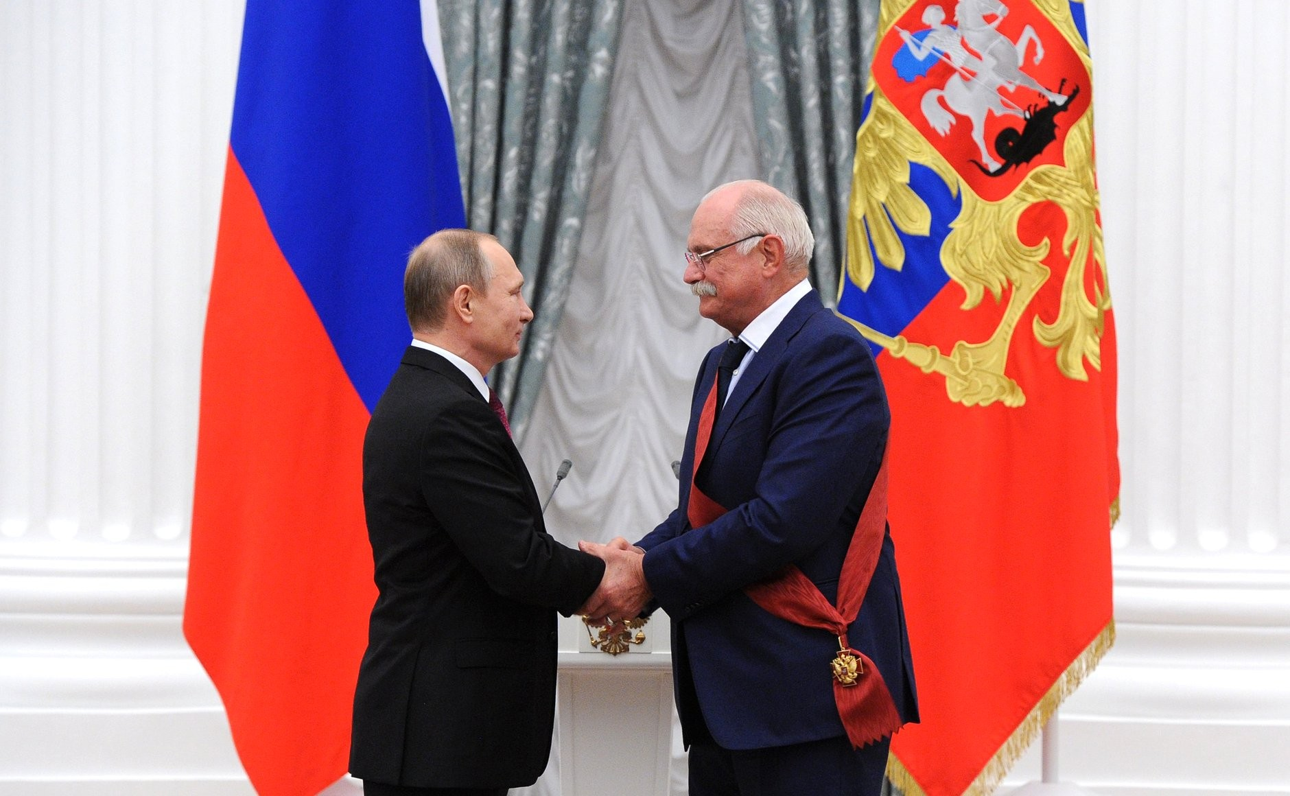 На церемонии вручения государственных наград Российской Федерации. Орденом «За заслуги перед Отечеством» I степени награждён кинорежиссёр, председатель Союза кинематографистов Никита Михалков.